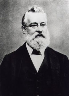 Der englischer Chemiker John Alexander Reina Newlands (1838-1898)